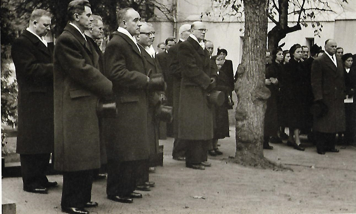 Saattojoukko. Pääministeri Urho Kekkonen keskellä